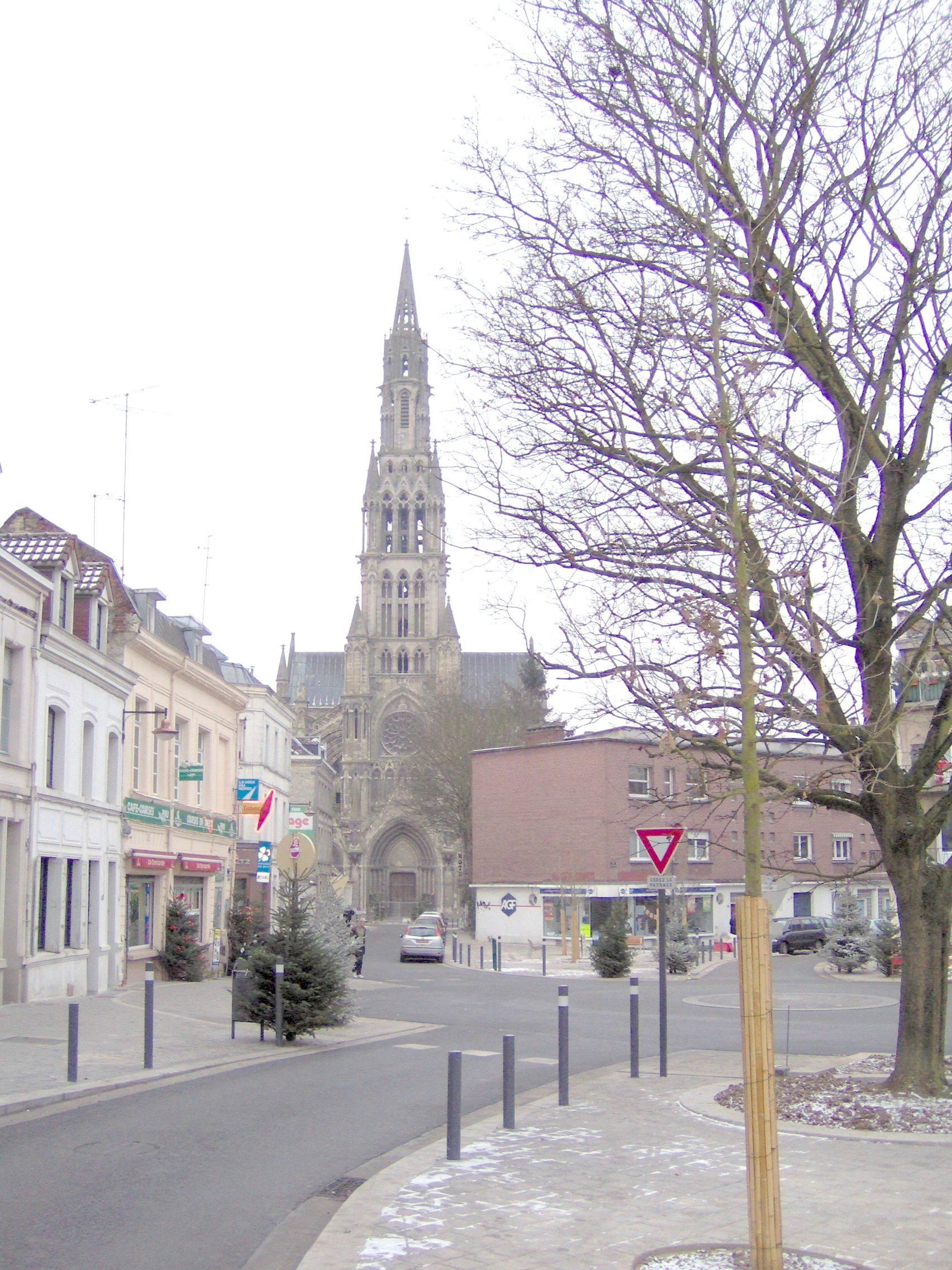 Église Notre-Dame-du-Saint-Cordon de Valenciennes (Nord, France).